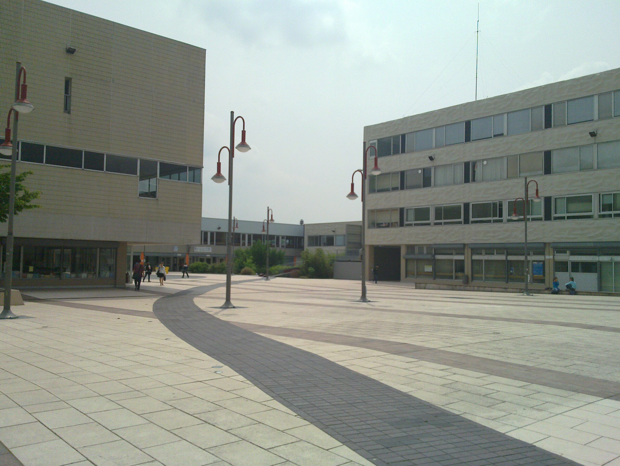 Université Charles-de-Gaulle - Lille 3, Villeneuve d'Ascq.